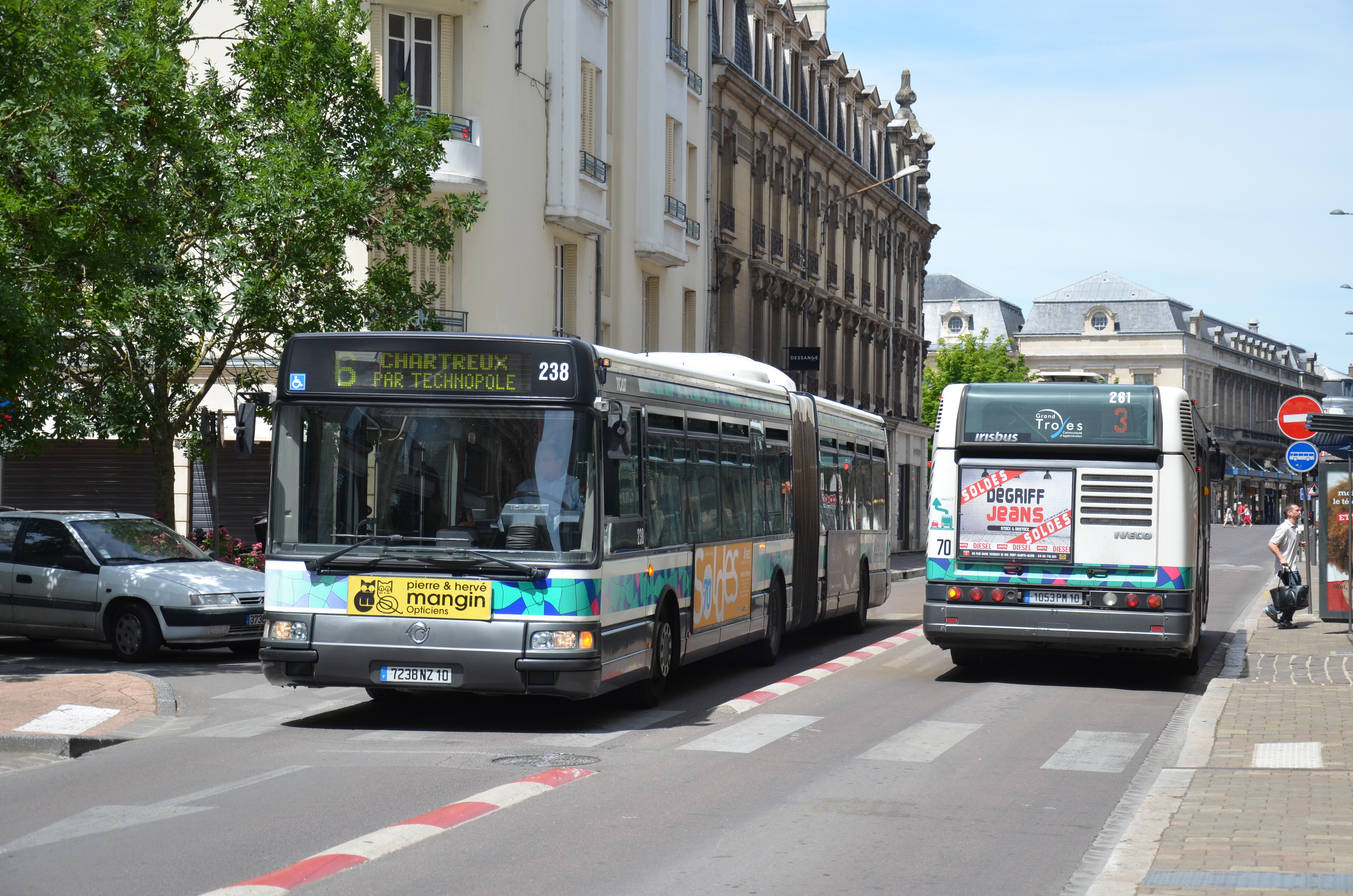 Irisbus Agora L n°238 de la ligne 6 et Irisbus Agora S n°261 sur la ligne 3 du réseau TCAT de Troyes, à l'arrêt Langevin.